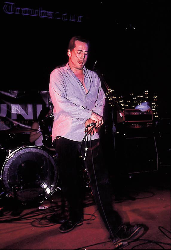 unida live at troubadour (los angeles) 6.1.2000